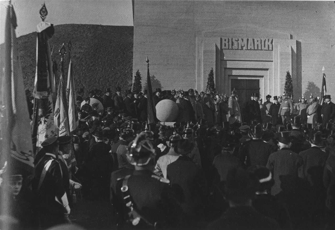 Einweihung des Bismarckturmes in Lützschena-Stahmeln, 1. April 1915.